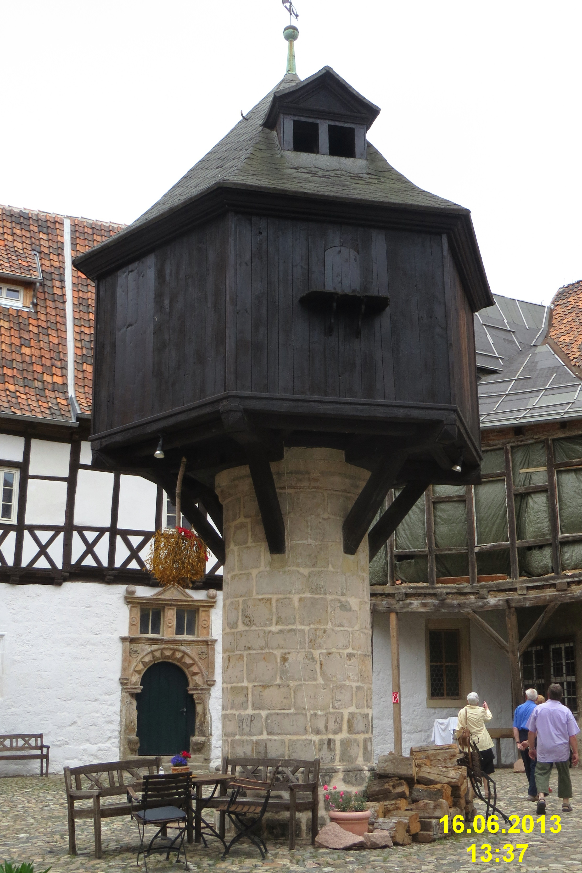 Quedlinburg